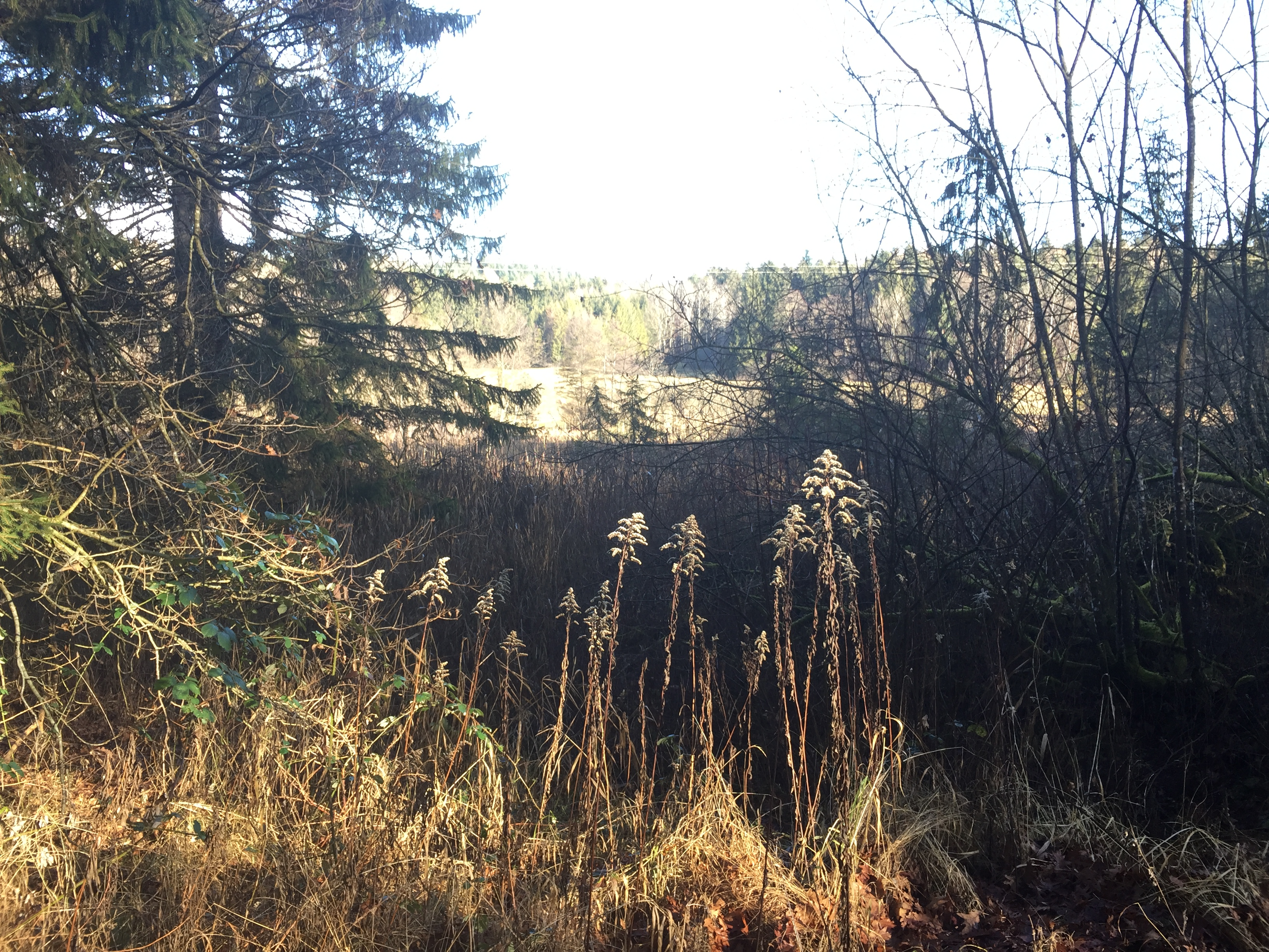 Naturschutzgebiet Bussenried, Allensbach, Landkreis Konstanz